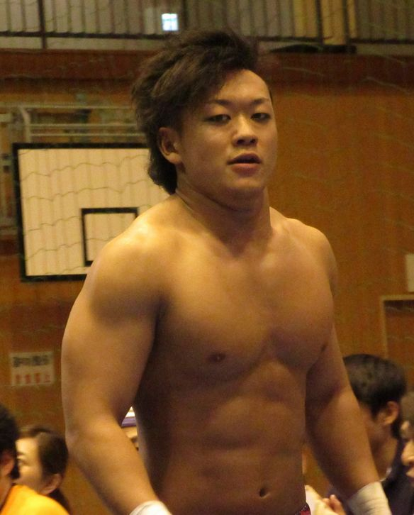 20016.7.30奈良